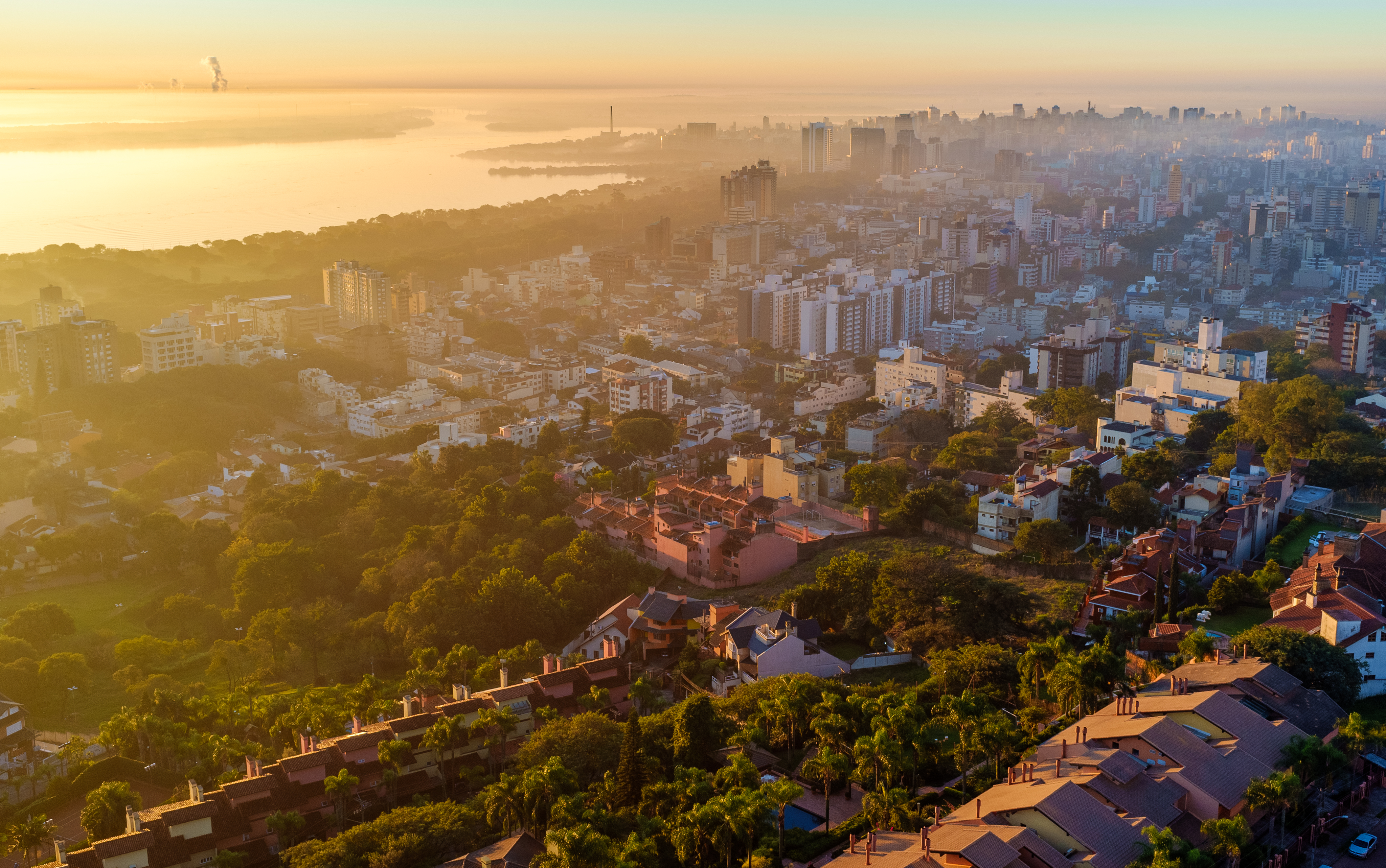 Porto Alegre vista a partir do Morro Santa Teresa.